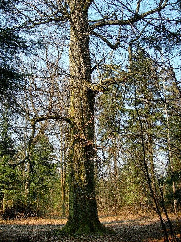 Buk Kościuszki